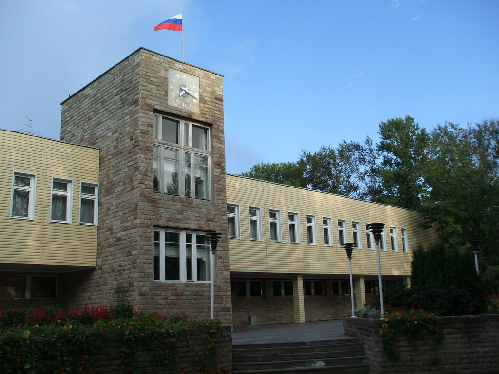 Волховская городская администрация